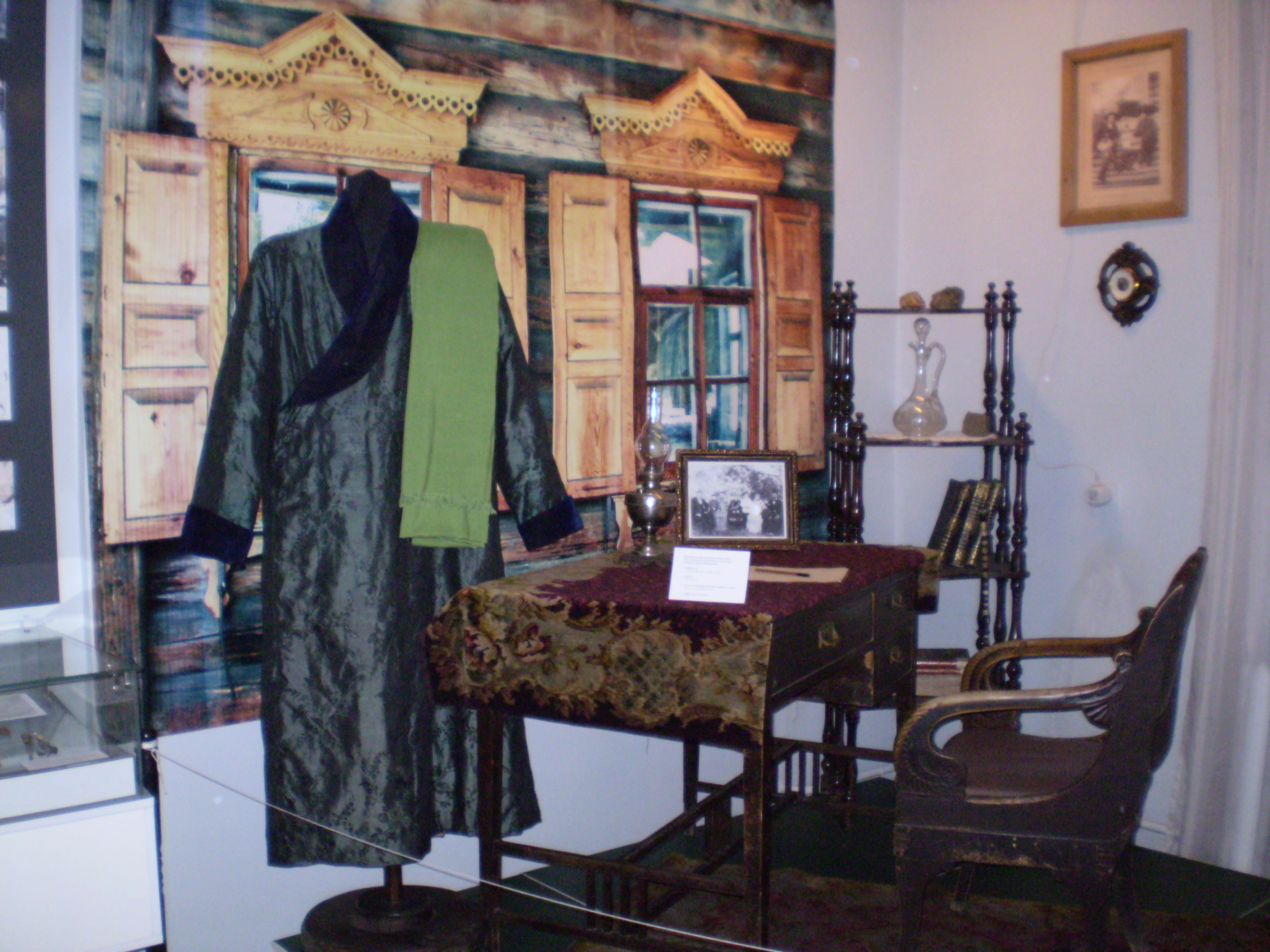 Музей истории Бурятии. Вещи Матвея Николаевича Хангалова.